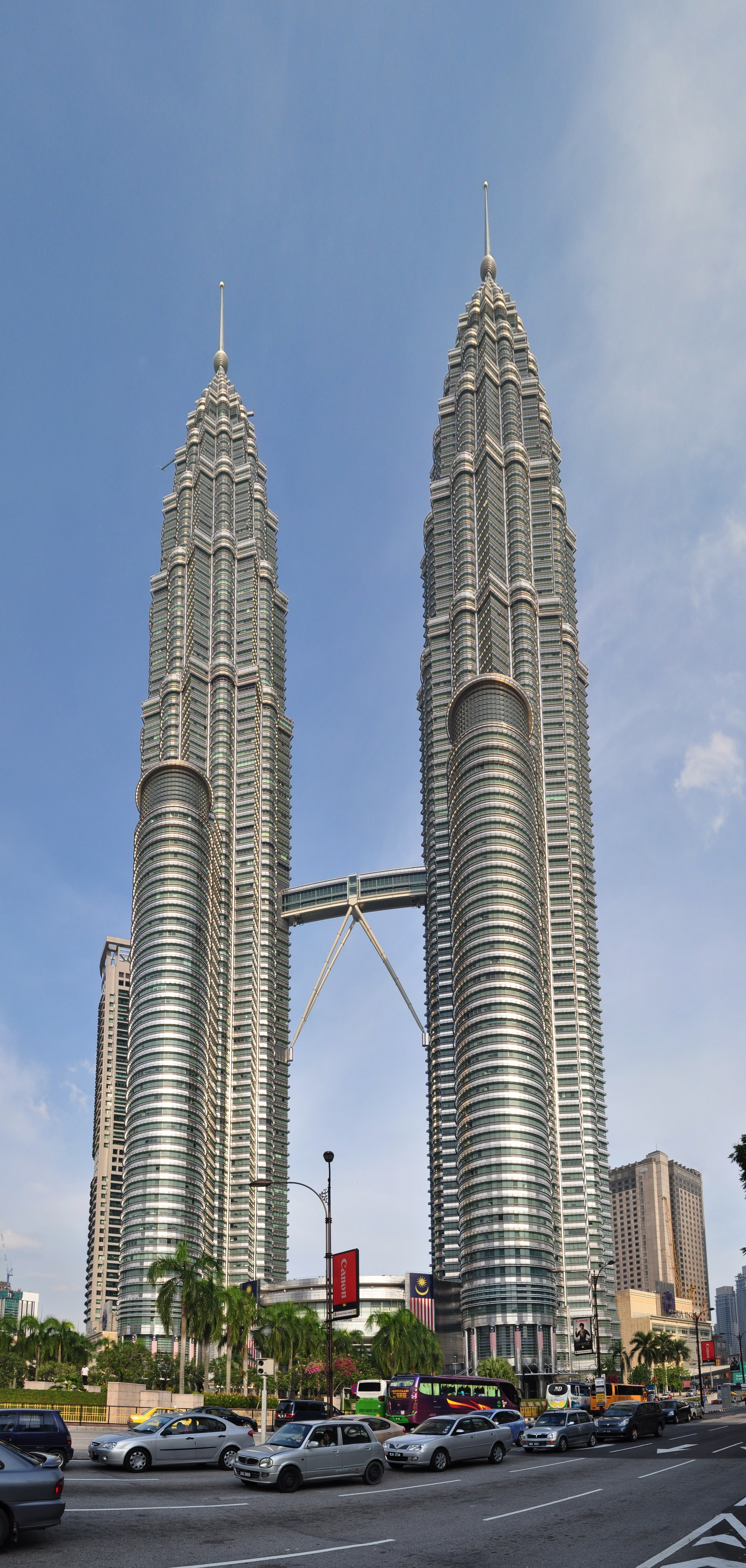 The Petronas Twin Towers in Kuala Lumpur, Malaysia